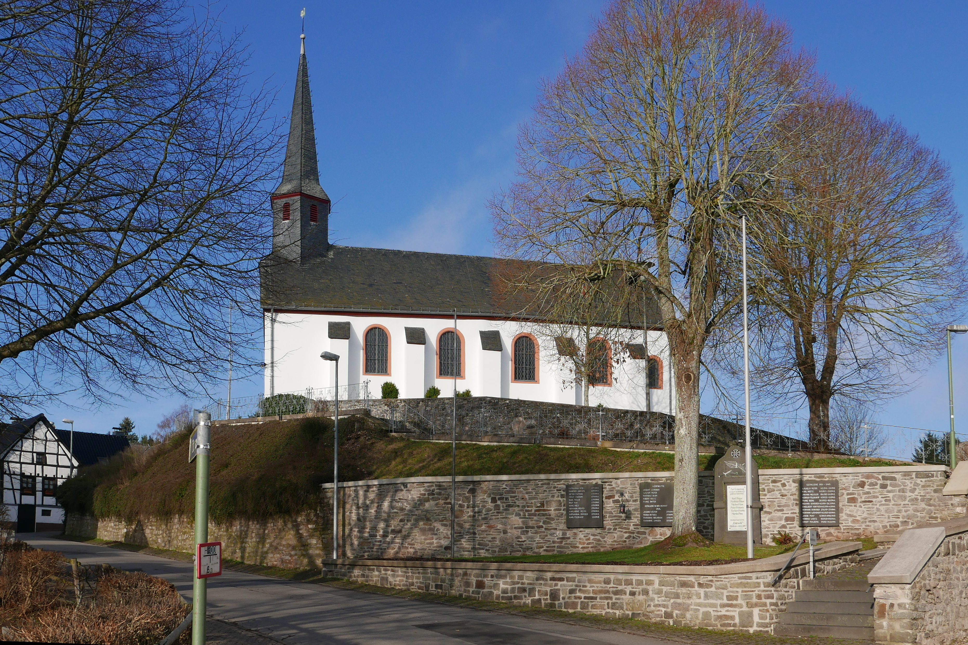 Mülheim, Ortsgasse 2; kath. Pfarrkirche 1, von S